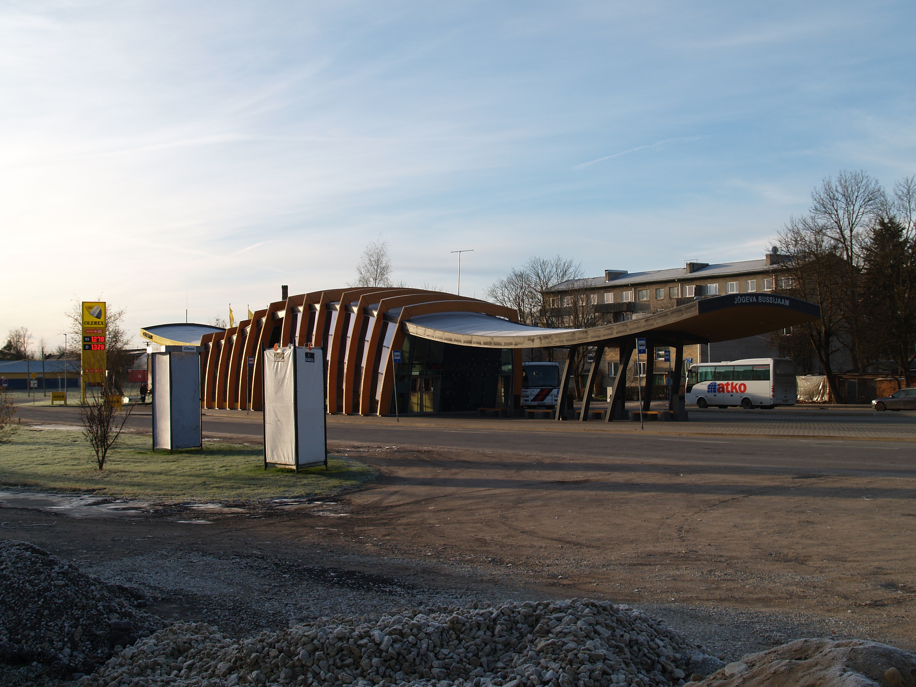 Jõgeva bussijaam